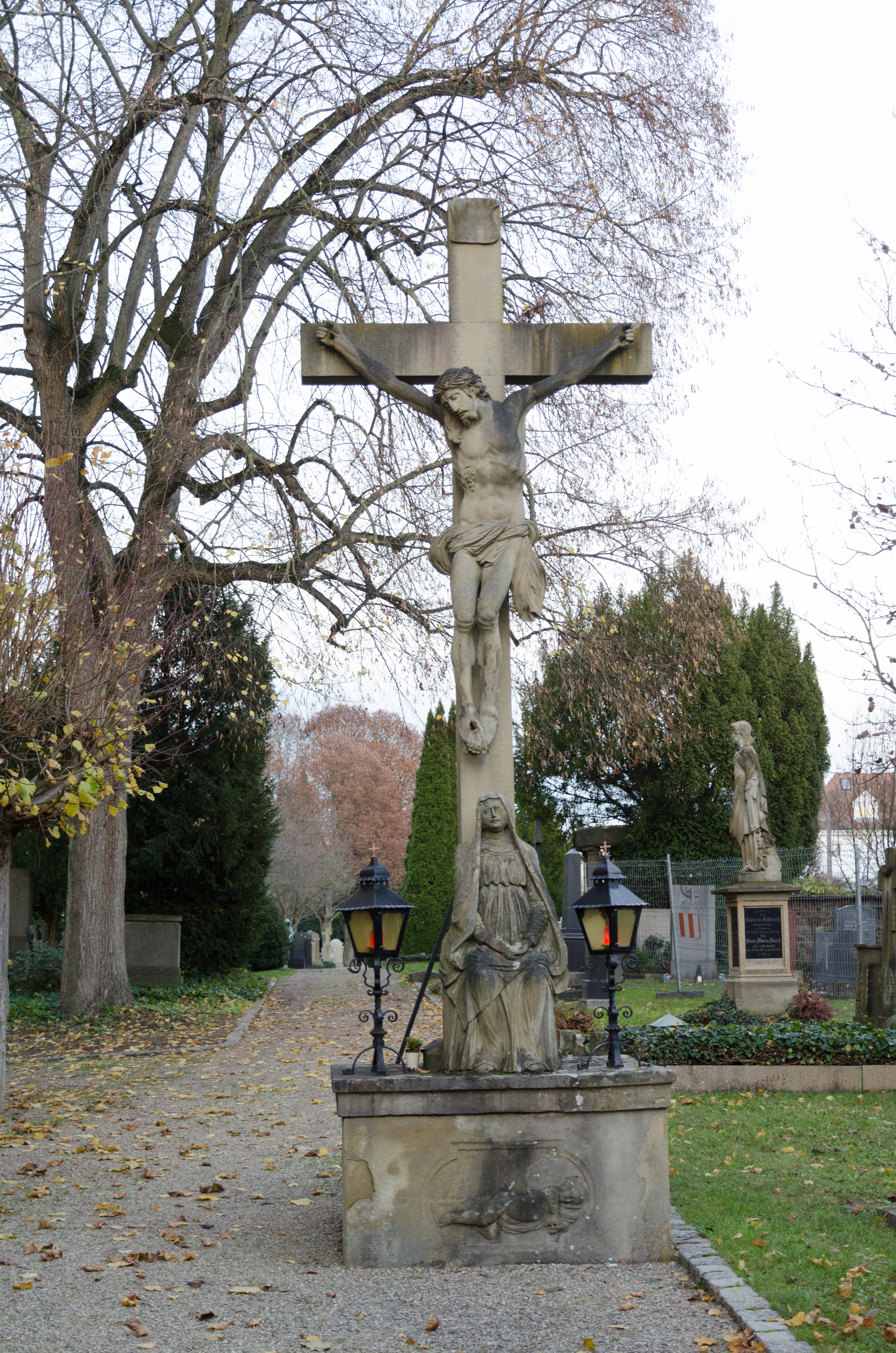 Bad Kissingen, Friedhofskreuz